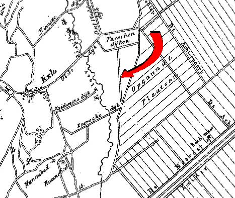 Fragment omgeving Exloo (de locatie van de Boermastreek door mij met rode pijl gemarkeerd)